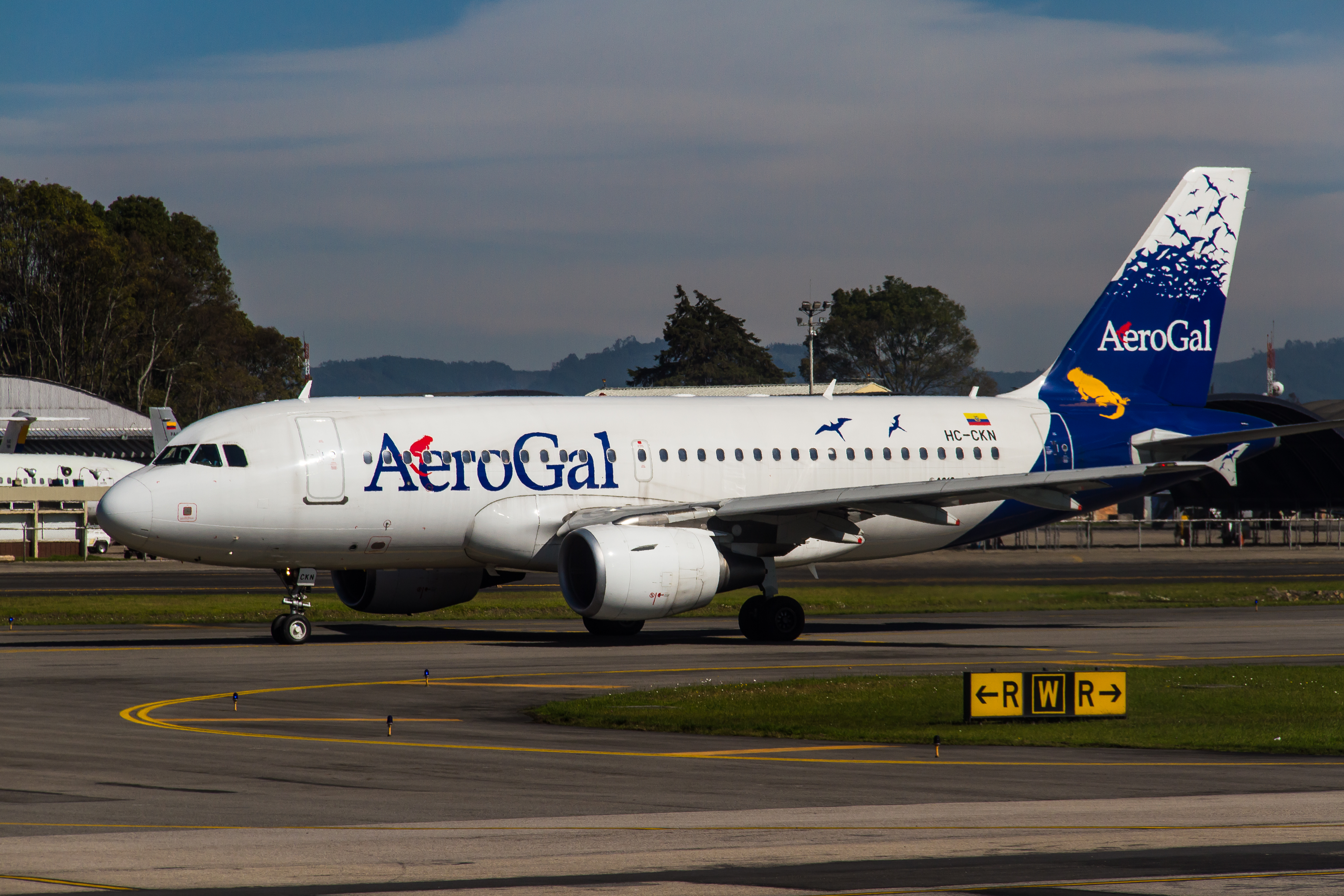 Aerogal